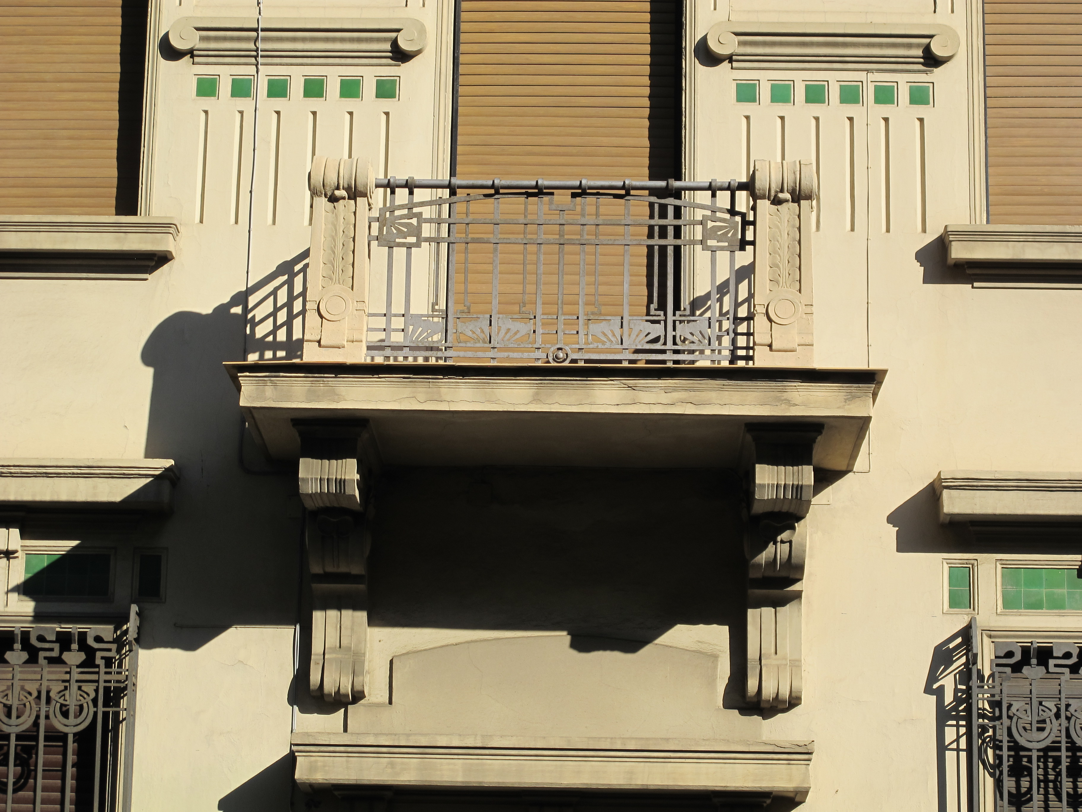 Viale Giuseppe Mazzini e dintorni, Firenze